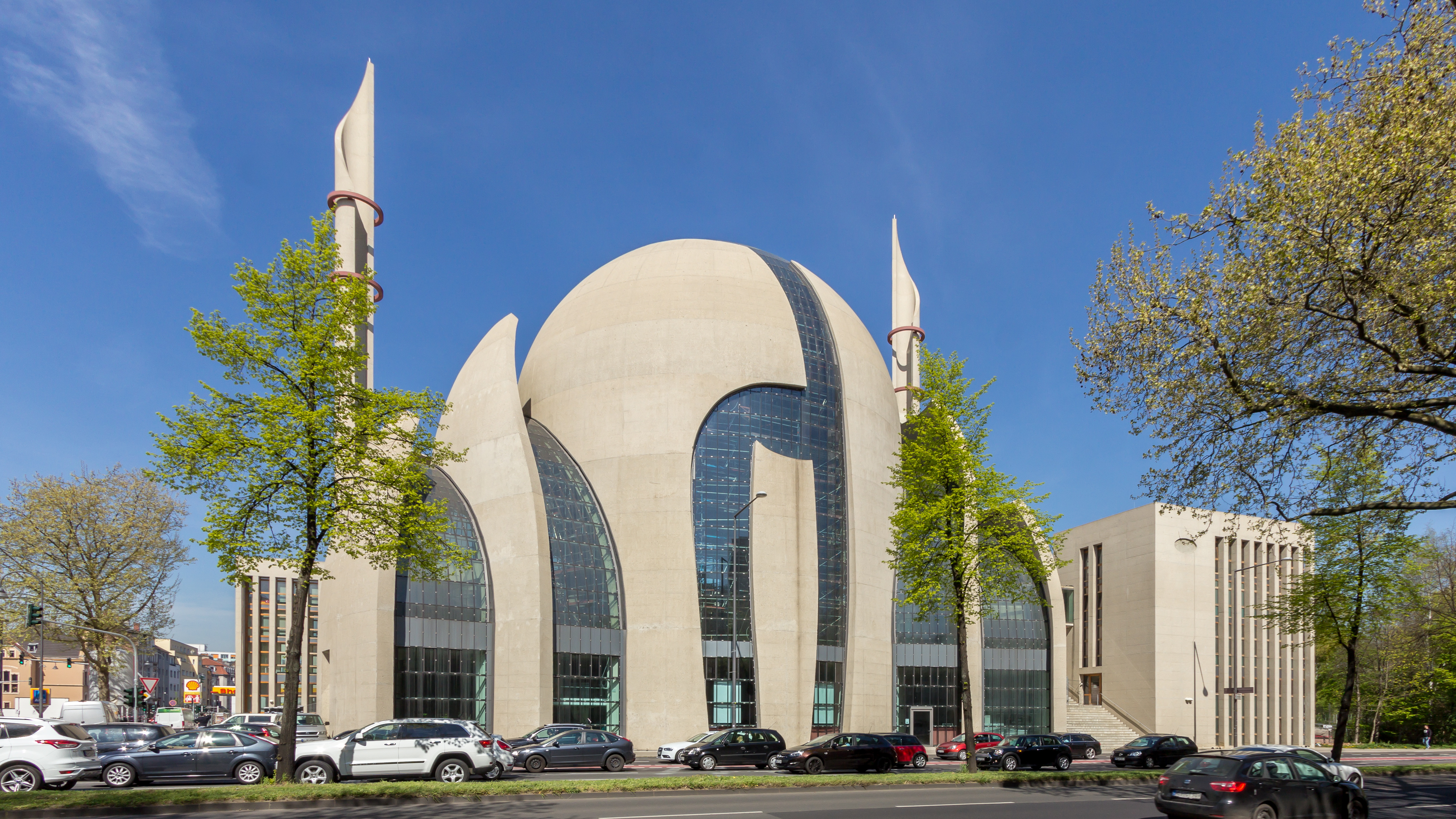 DITIB-Zentralmoschee Köln - April 2015